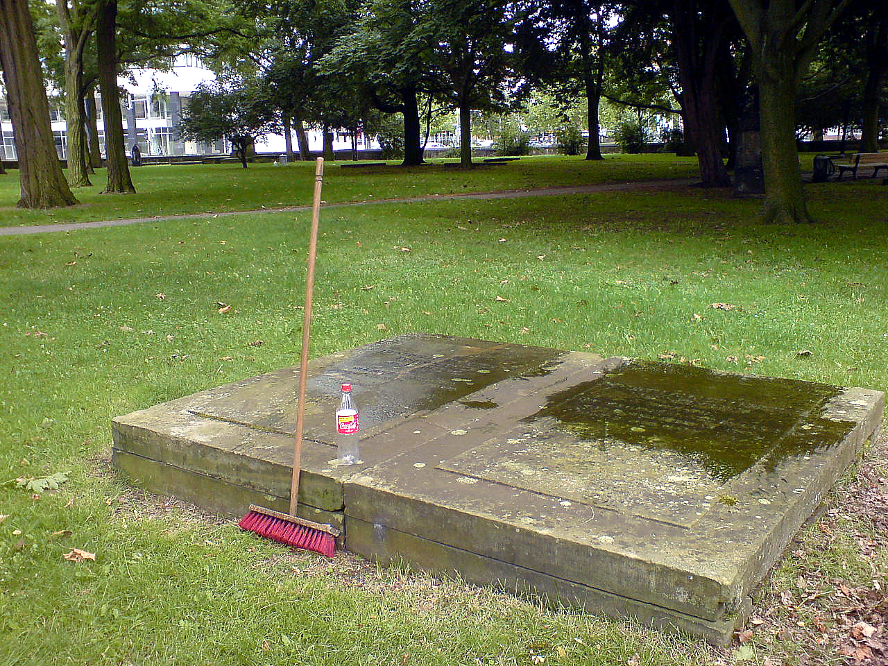 Doppelgrab von Friedrich August Christian Eisendecher und seiner Ehefrau und Witwe Henriette Friederike Eisendecher, geborene Ramberg, geboren am 6. Februar 1801, gestorben am 12. September 1860; Neustädter Friedhof in Hannover. Mit einem Besen und zwei Flaschen Wasser wurden die Inschriften lesbar gemacht und damit eigene, von Dritten überprüfbare Foto-Dokumente geschaffen, um der Nachweispflicht nicht nur bei Wikipedia zu genügen.